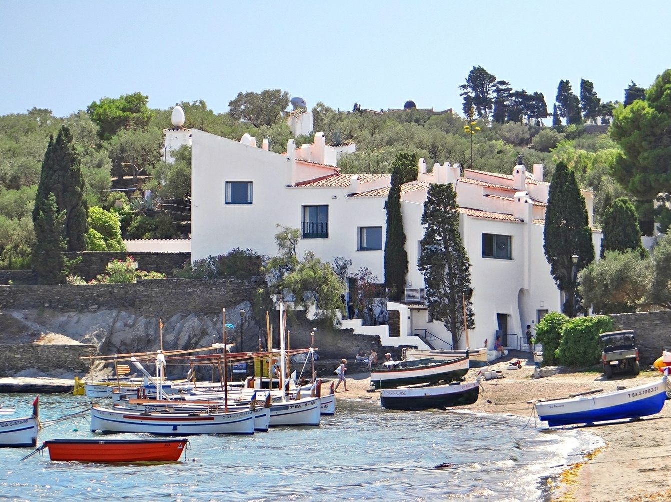 La maison-musée Salvador Dali au bord de l'eau à Portlligat en Catalogne près de Cadaqués En 1930, Dali achète à Lidia Noguer une première cabane de pêcheur, très rapidement il en achète une seconde puis au cours des années il fait construire selon ses propres plans des parties complémentaires pour en arriver à la maison actuelle dont les pièces sont étagées sur plusieurs niveaux. Il achète également les terrains autour et au-dessus de la maison pour aménager des terrasses plantées d'oliviers et y installer des oeuvres. L’actuelle Maison-musée de Portlligat a été la seule résidence stable de Salvador Dalí; l'endroit où il a vécu et travaillé régulièrement jusqu'à la mort de Gala, en 1982, date à laquelle il s'est installé au Château de Púbol. En 1930, séduit par le paysage, la lumière et l'isolement des lieux, Salvador Dalí s'était installé dans une petite maisonnette de pêcheurs de Portlligat. À partir de cette construction initiale, il créa peu à peu, quarante années durant, une maison, la sienne, qu'il définissait "comme une véritable structure biologique, [...]. À chaque nouvel élan de notre vie correspond une nouvelle cellule, une nouvelle pièce". Source : ouvrage "Dali de Gala", par Robert Descharnes, Edita SA Lausanne, 1962) Le site de la fondation